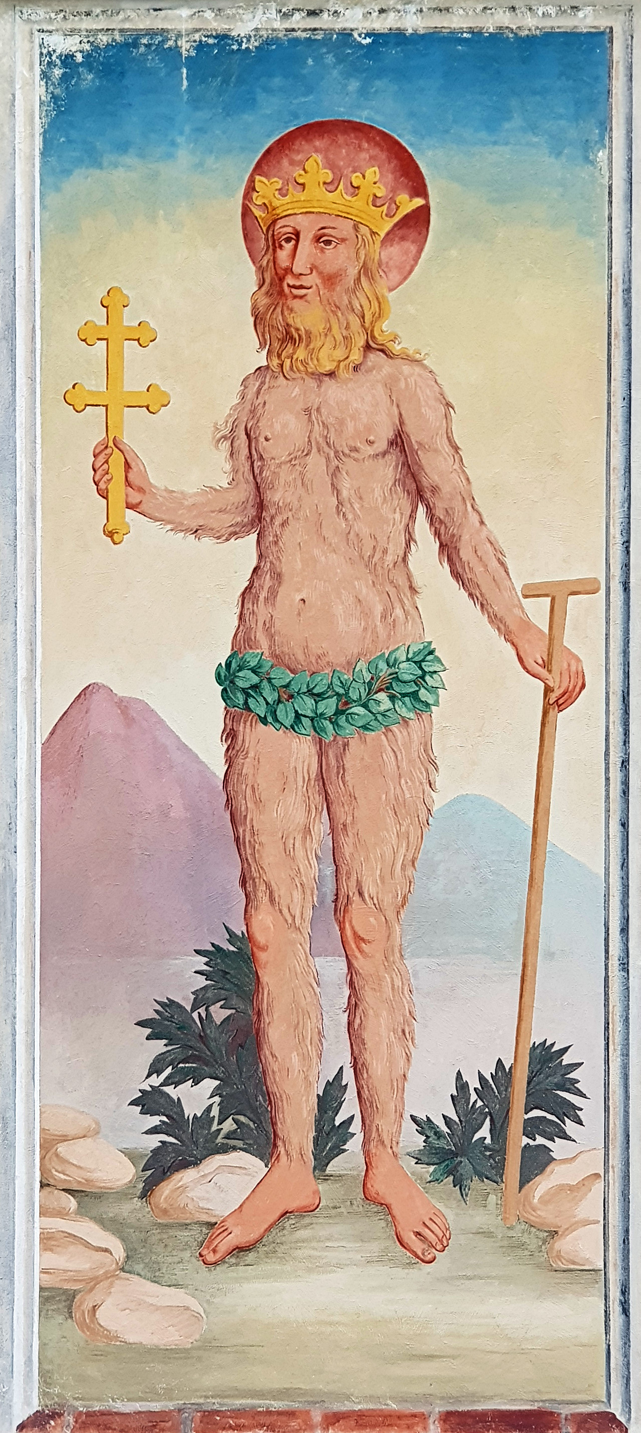 Nachbildung eines Außenfreskos des Heiligen Einsiedlers Onuphrios an der Kirche im Schloss Blutenburg in München; Kirchenmaler: Hermenegild Peikner aus Augsburg; ca. 1488